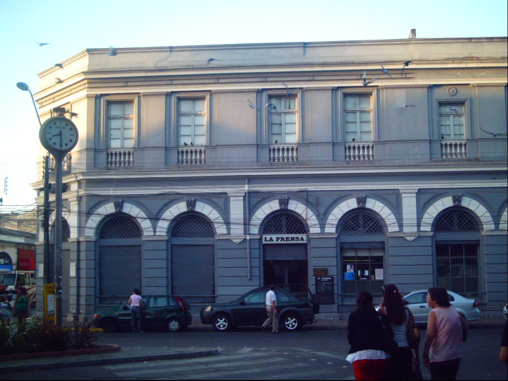 Headquarters of La Prensa newspaper in Curico in 2008. Later was destroyed in 2010 Earthquake (Casa matriz del diario La Prensa de Curicó en 2008, más tarde destruida por el Terremoto de 2010).